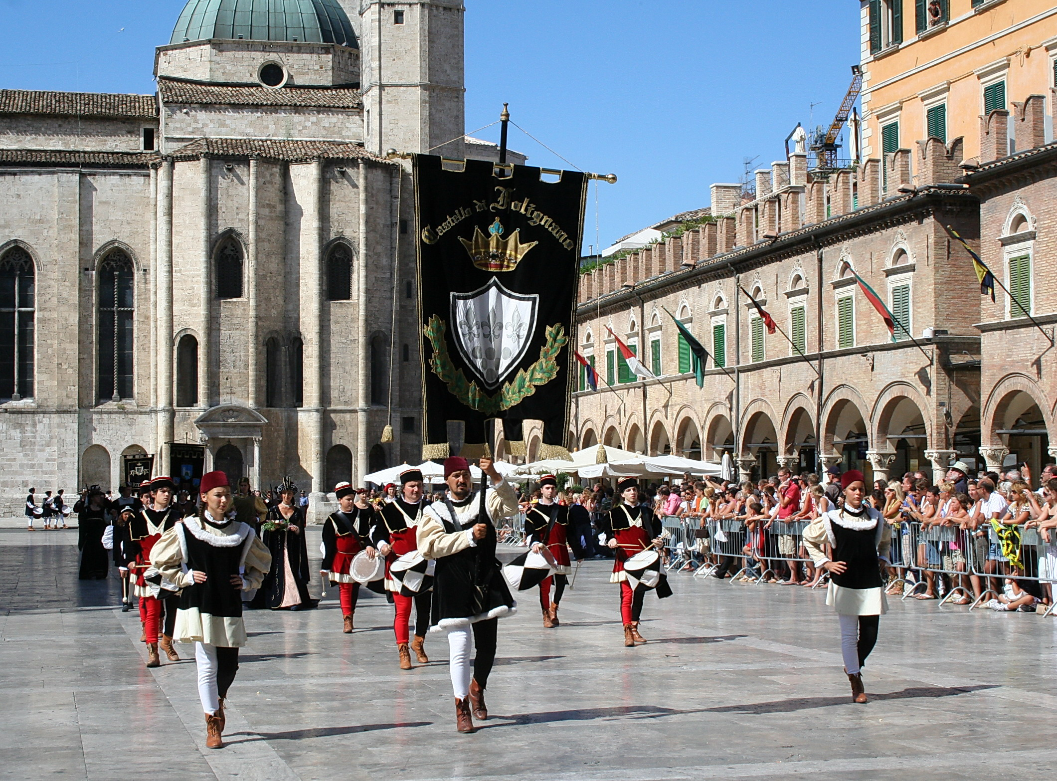 Gruppo Castello di Folignano, Quintana del 5 agosto 2007.